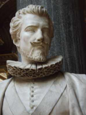 Buste d'Anne de Joyeuse, par Isidore Hippolyte Brion (1799-1863), dans la Galerie des batailles du château de Versailles.